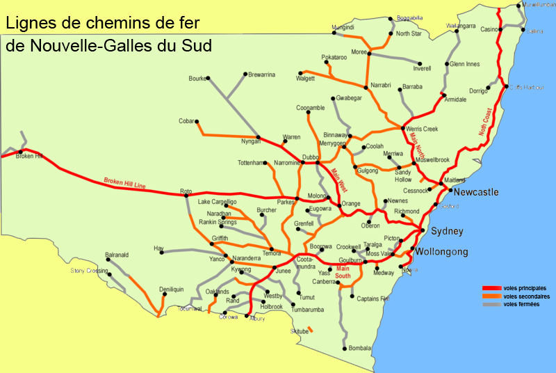 Lignes de chemins de fer de Nouvelle-Galles du Sud